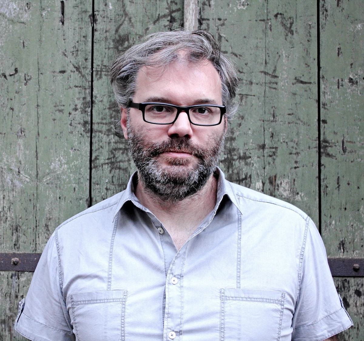 Matteo Corradini, ebraista e scrittore italiano.